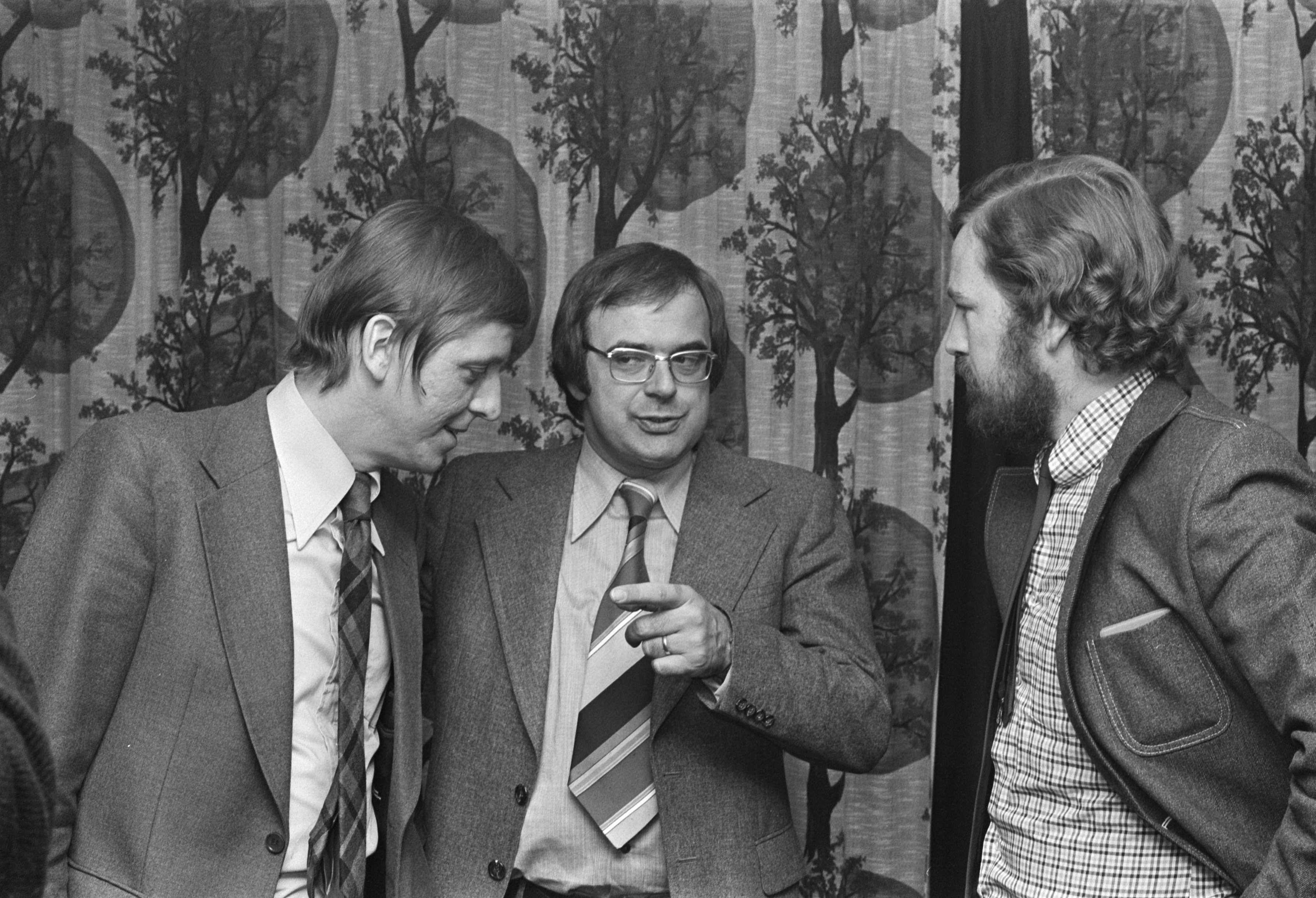 Dick Scherpenzeelprijs uitgereikt door minister Pronk (midden) aan Harry Lockefeer (hoofdredacteur van De Volkskrant, links) en journalist Jan van der Putten (rechts). Datum 10 november 1975